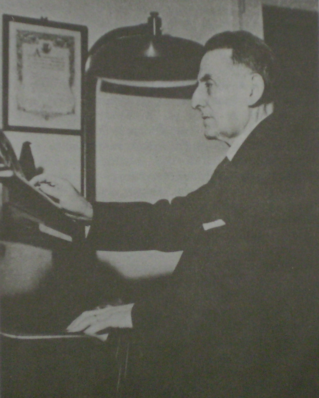 Gilardo Gilardi (1899—1963)